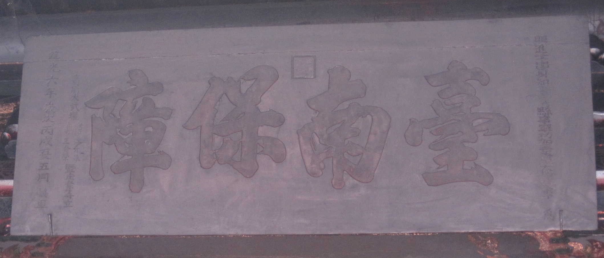 中文（台灣）: 玉井北極殿「臺南保障」匾